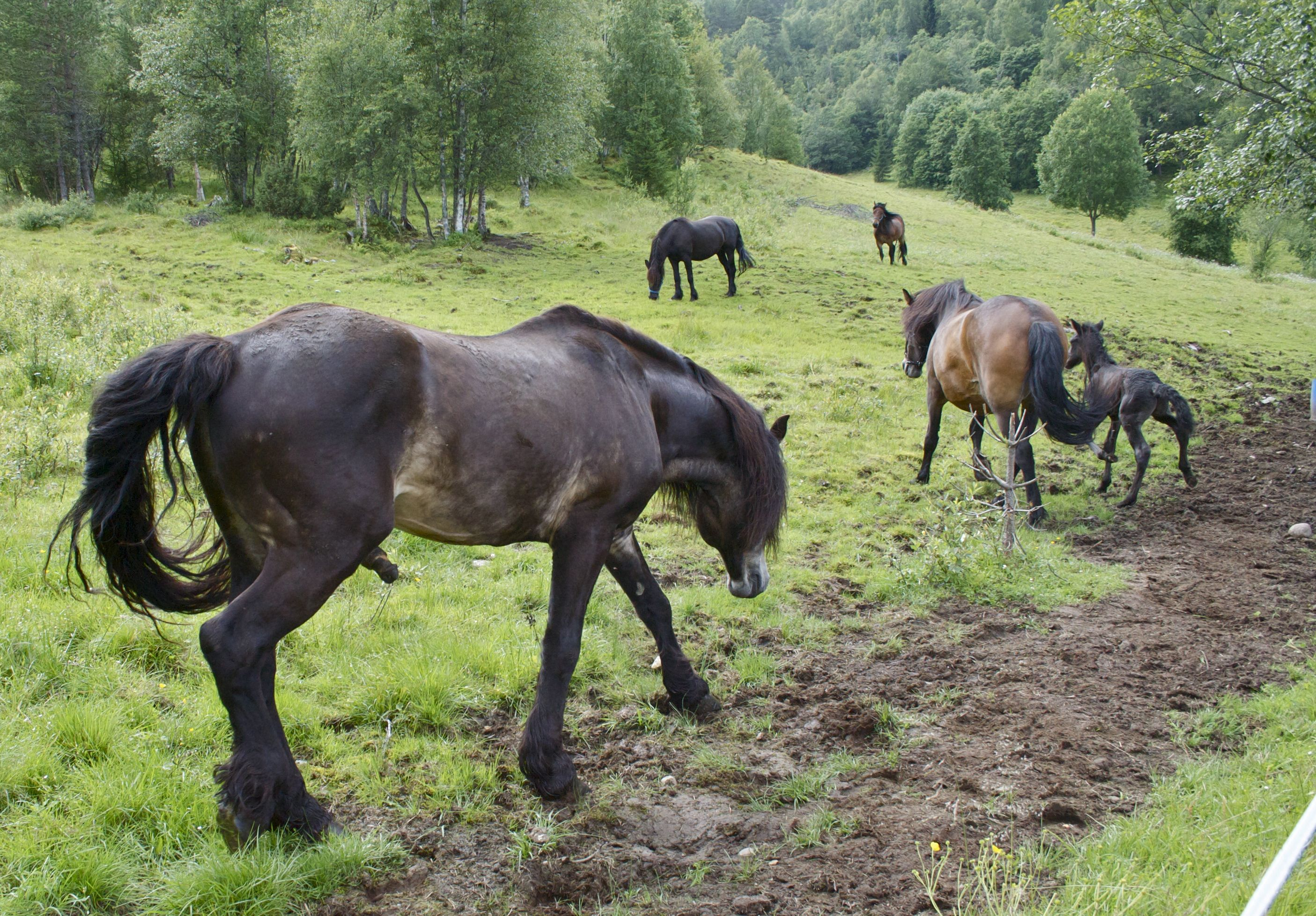 Bork Rigel i avelstjeneste 23 år gammel